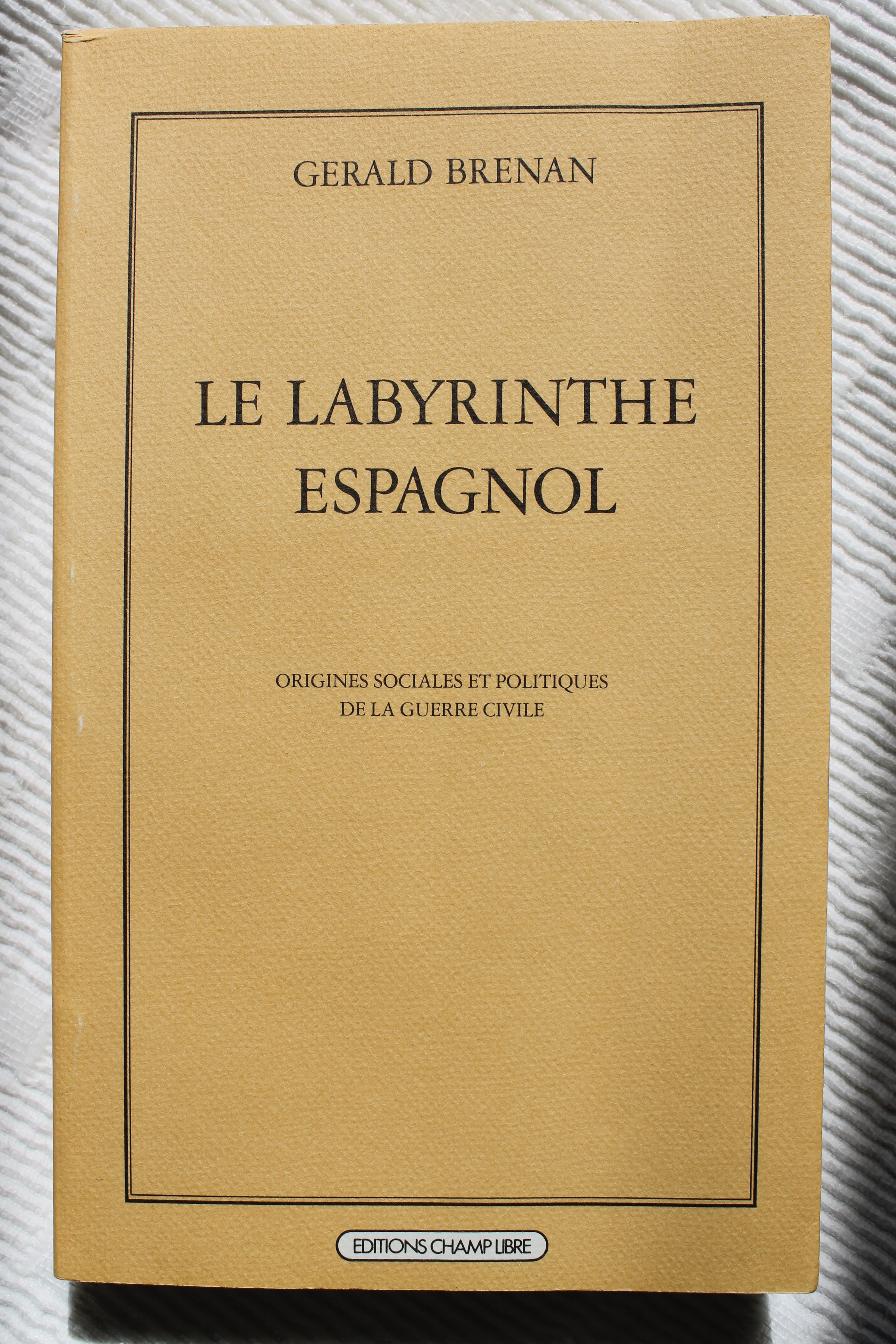 Couverture du livre de Gerald Brenan, "Le Labyrinthe espagnol", Éditions Champ libre, 1984